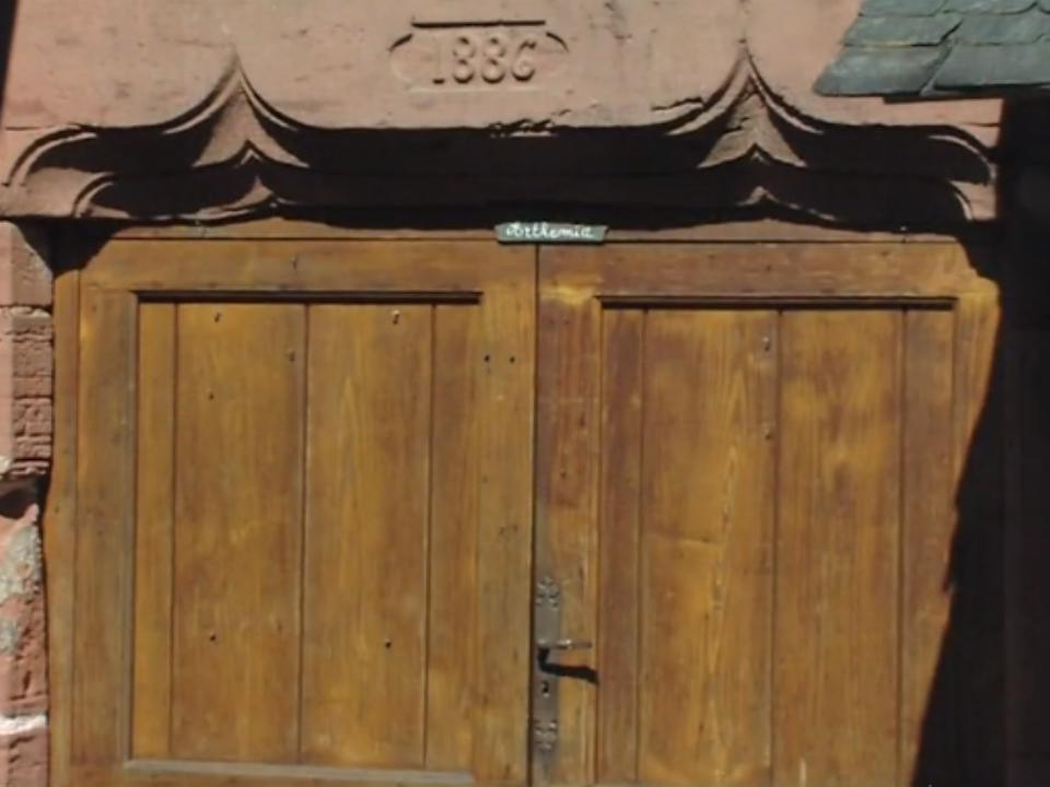 Collonges-la-Rouge. porte à double accolade qui affiche le chronogramme de 1886